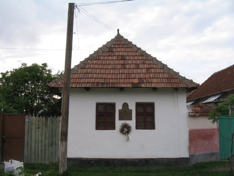 Moyses Márton szülőháza Nagyajtán